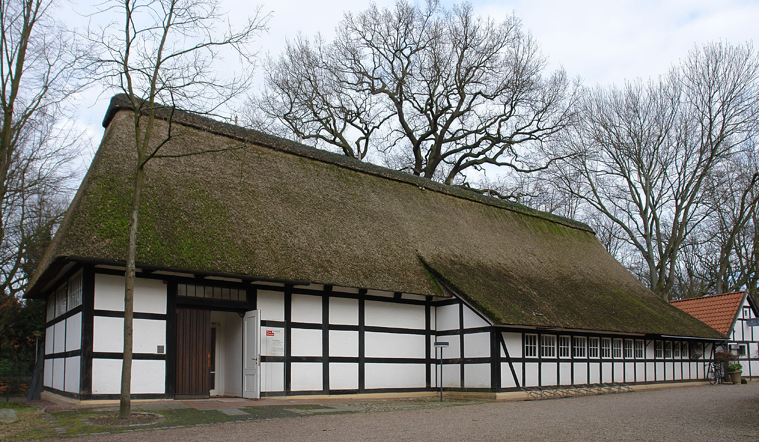 Focke-Museum Bremen: Eichenhof, ehemalige Scheune von Gut Riensberg)